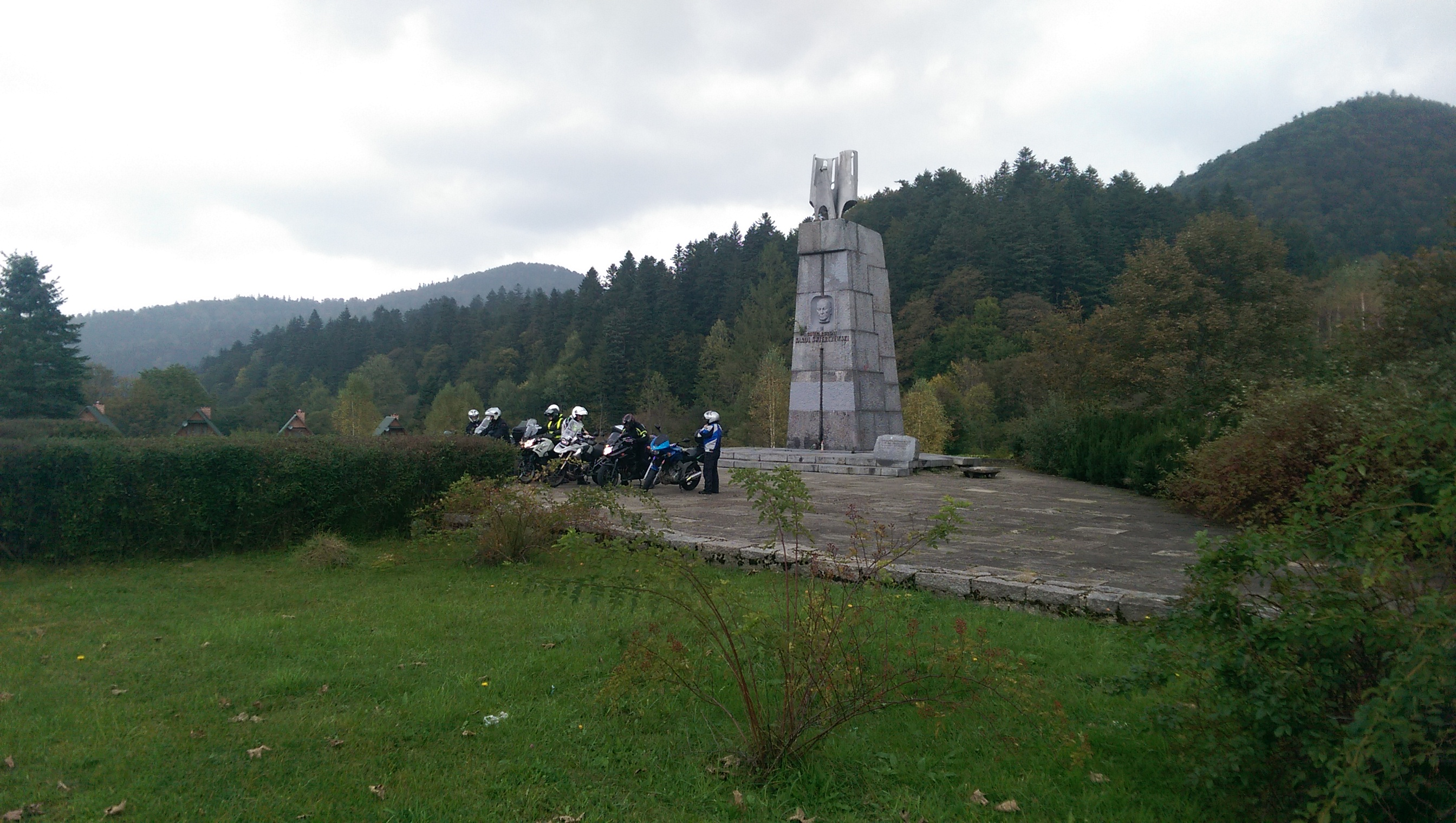 Miejsce gdzie zginął generał.